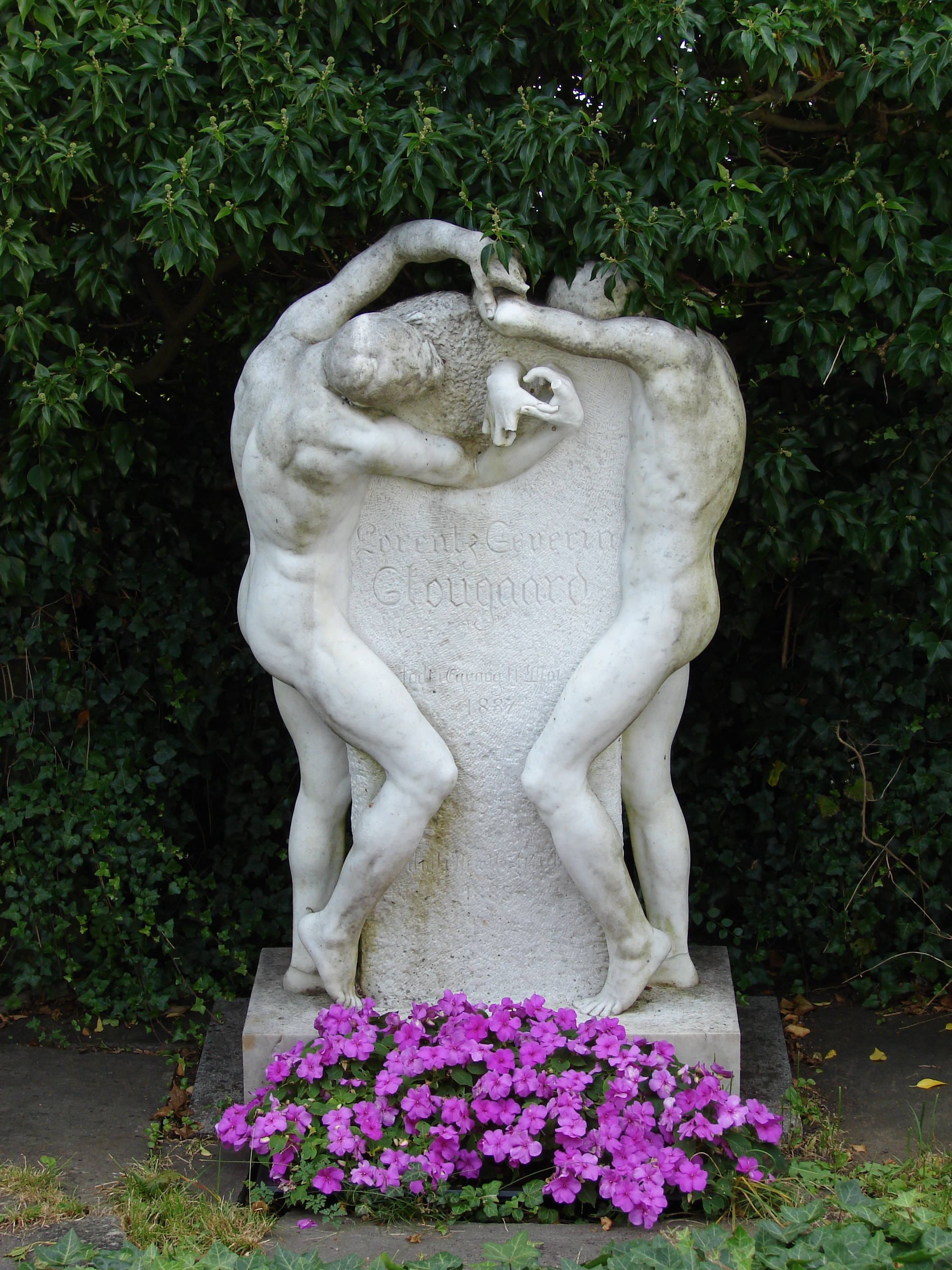 “Brotherly Love” fra 1887, gravminde for Lorentz Severin Skougaard (Severini) (1837–1885), af George Grey Barnard (1863-1938), Langesund Kirkegård, Telemark